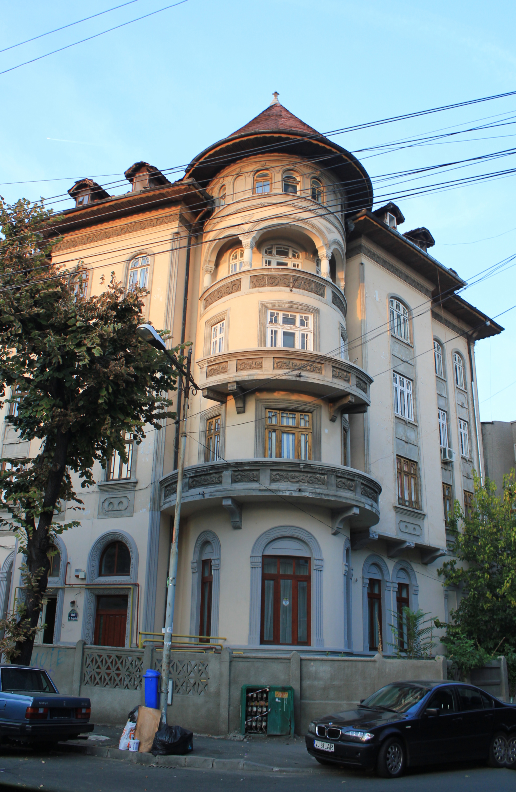 Casă Burghelea 19